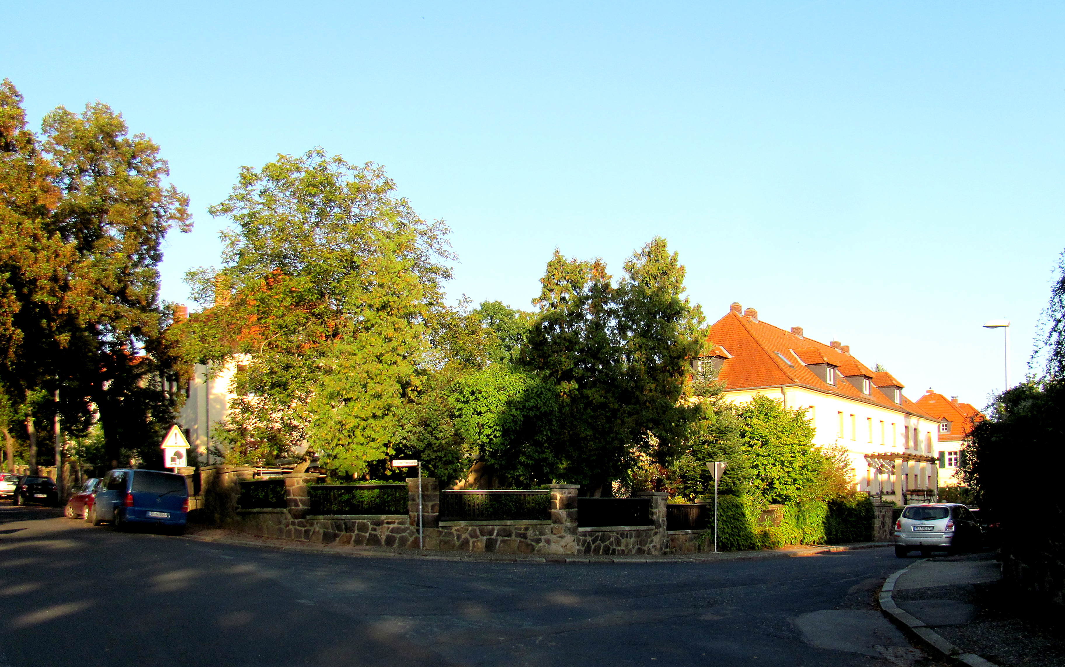 Radebeul-Niederlößnitz, Gröba-Siedlung von Südwest, Dr.-Rudolf-Friedrichs-Straße Ecke Stosch-Sarrasani-Straße